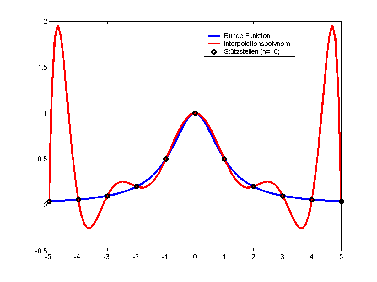 Interpolation der Rungefunktion bei 10 äquidistanten Stützstellen